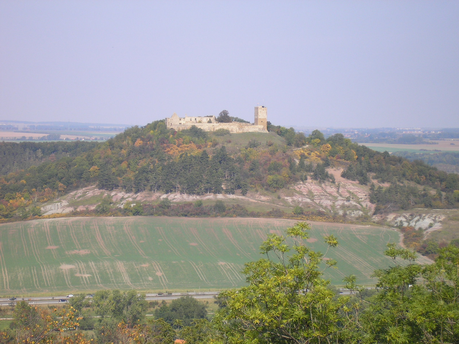 Die Burg Gleichen bei Wandersleben (Thüringen) von der Mühlburg aus gesehen.